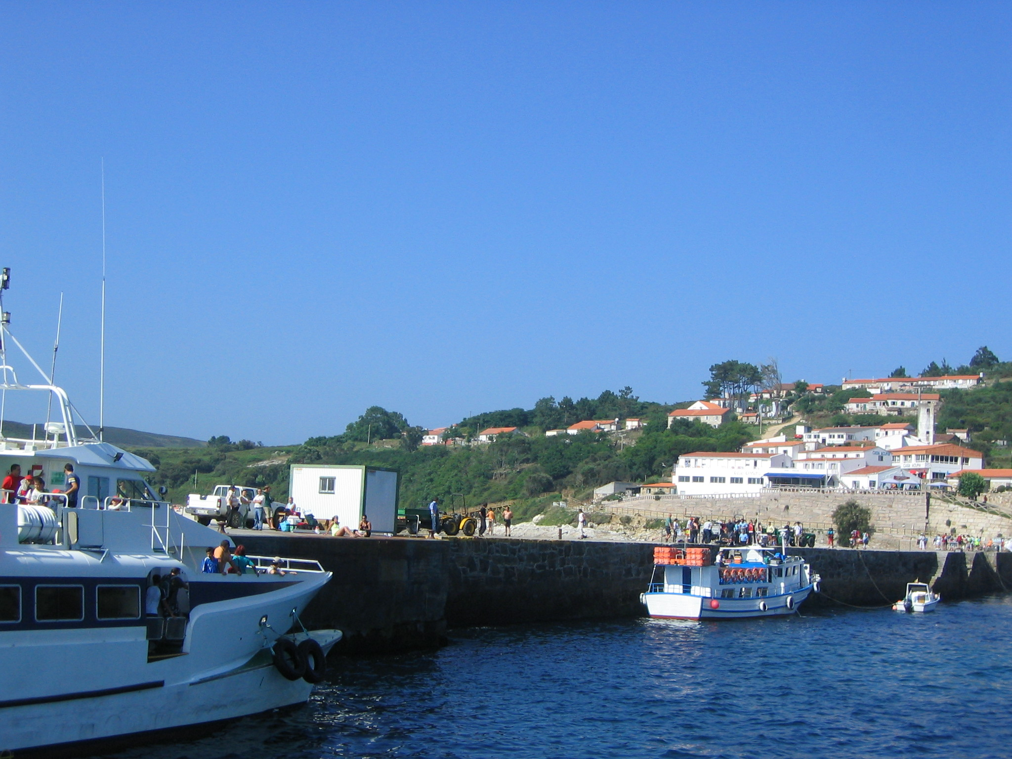 Muelle de la Isla de Ons y población de Curro. Bueu Pontevedra.